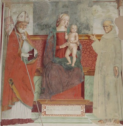 La Madonna con Sant'Esuperanzio e San Bernardino, affresco nella Collegiata di Sant'Esuperanzio a Cingoli; il santo vescovo porta il gonfalone della città.